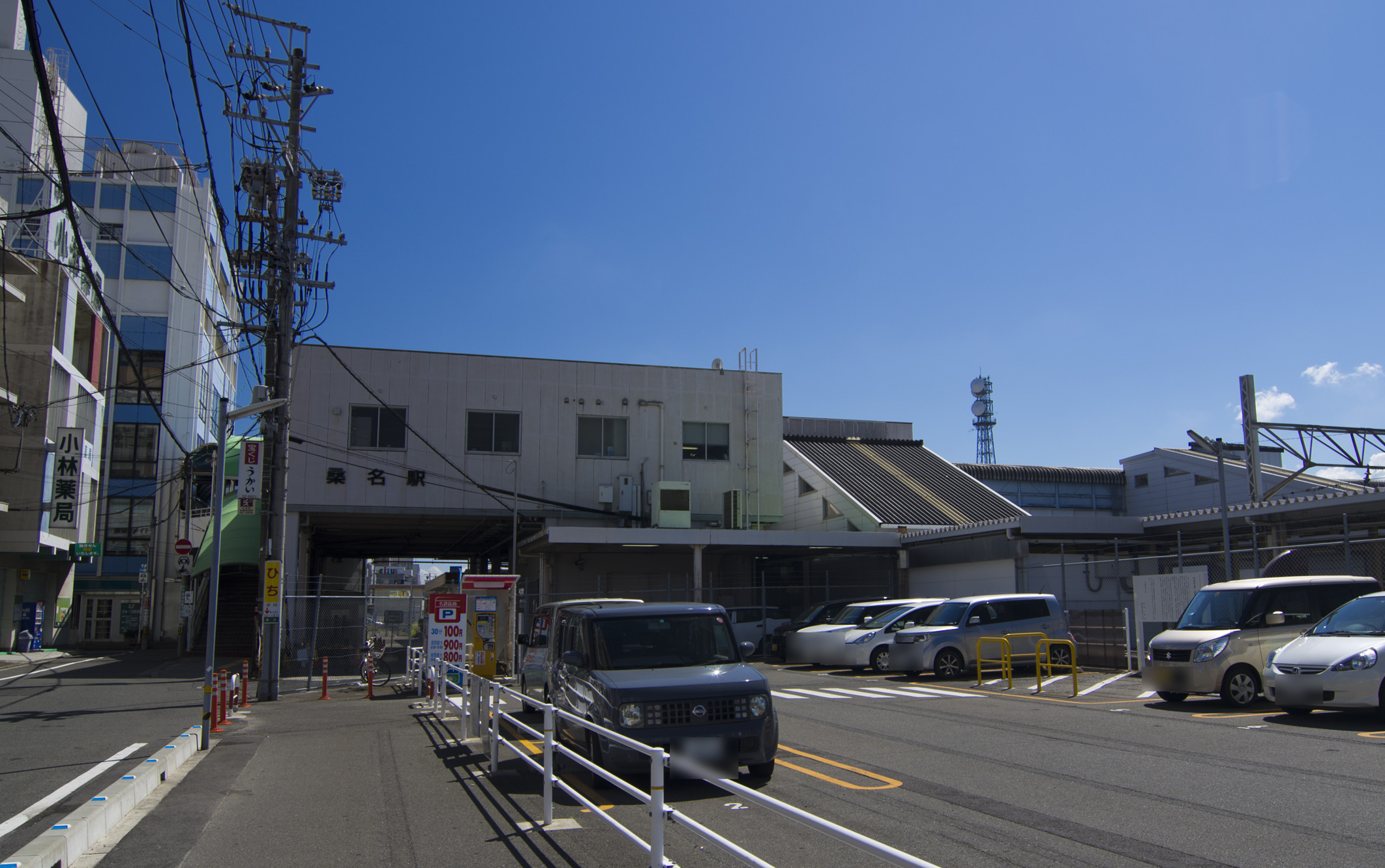 東海旅客鉄道関西本線、近畿日本鉄道名古屋線、養老鉄道養老線桑名駅東口駅舎